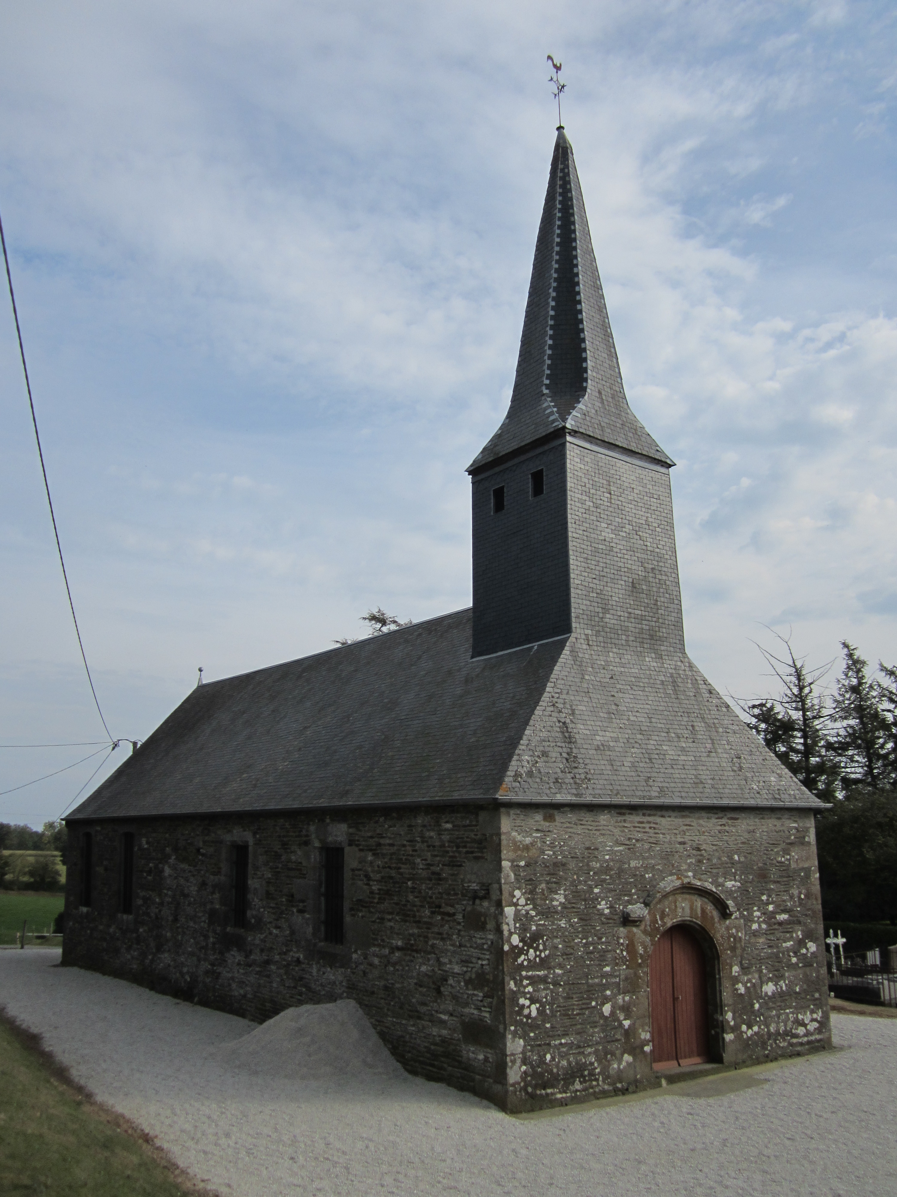 Chasseguey, Manche